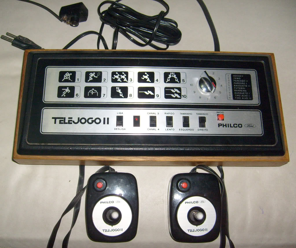 Foto do Videogame Telejogo II da Philco Ford